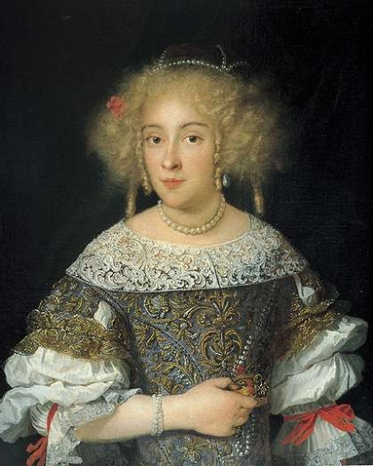 Ritratto della figlia di Paolo Del Sera, agente a Venezia del cardinal Leopoldo de' Medici